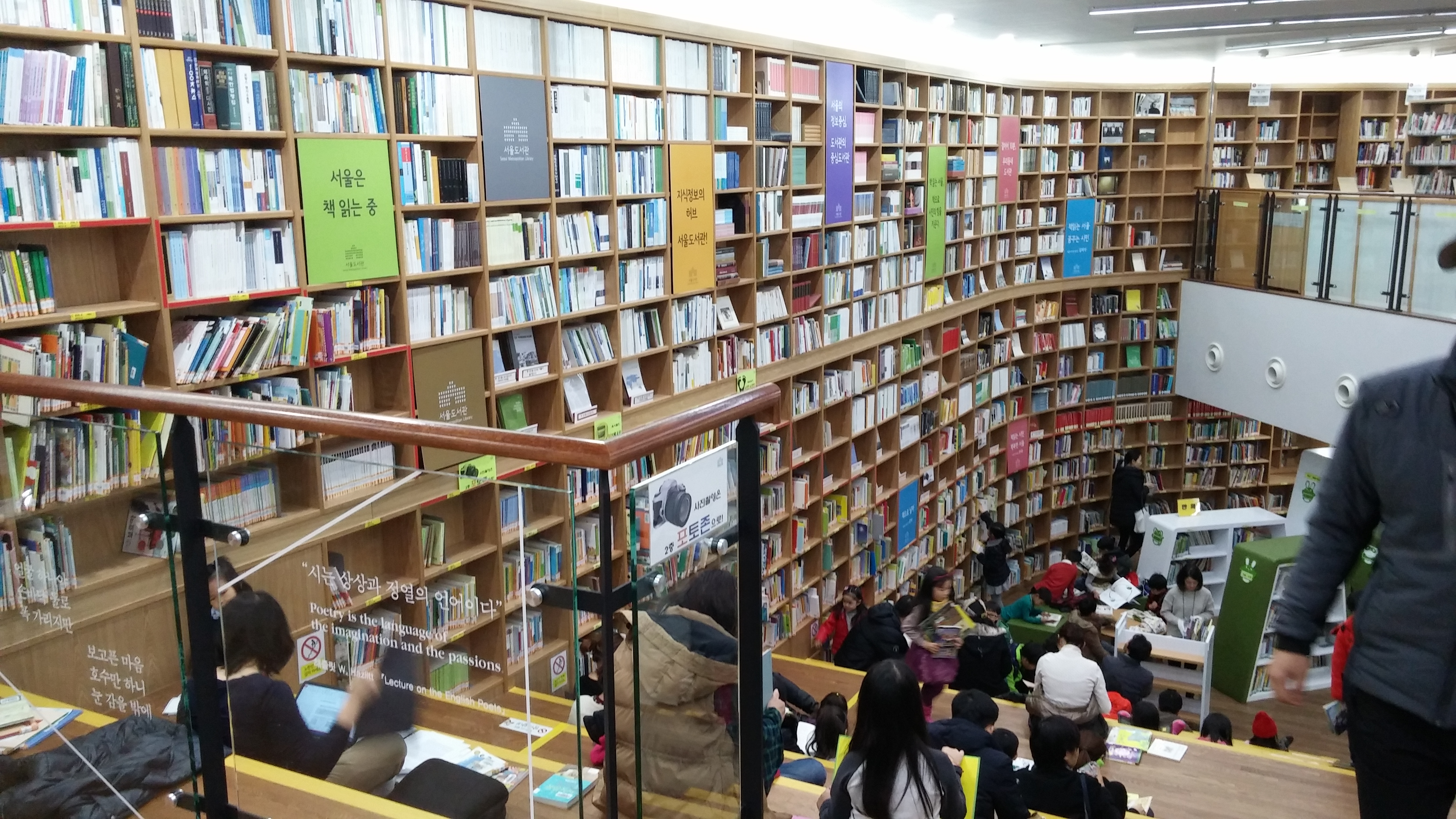 서울 도서관 내부